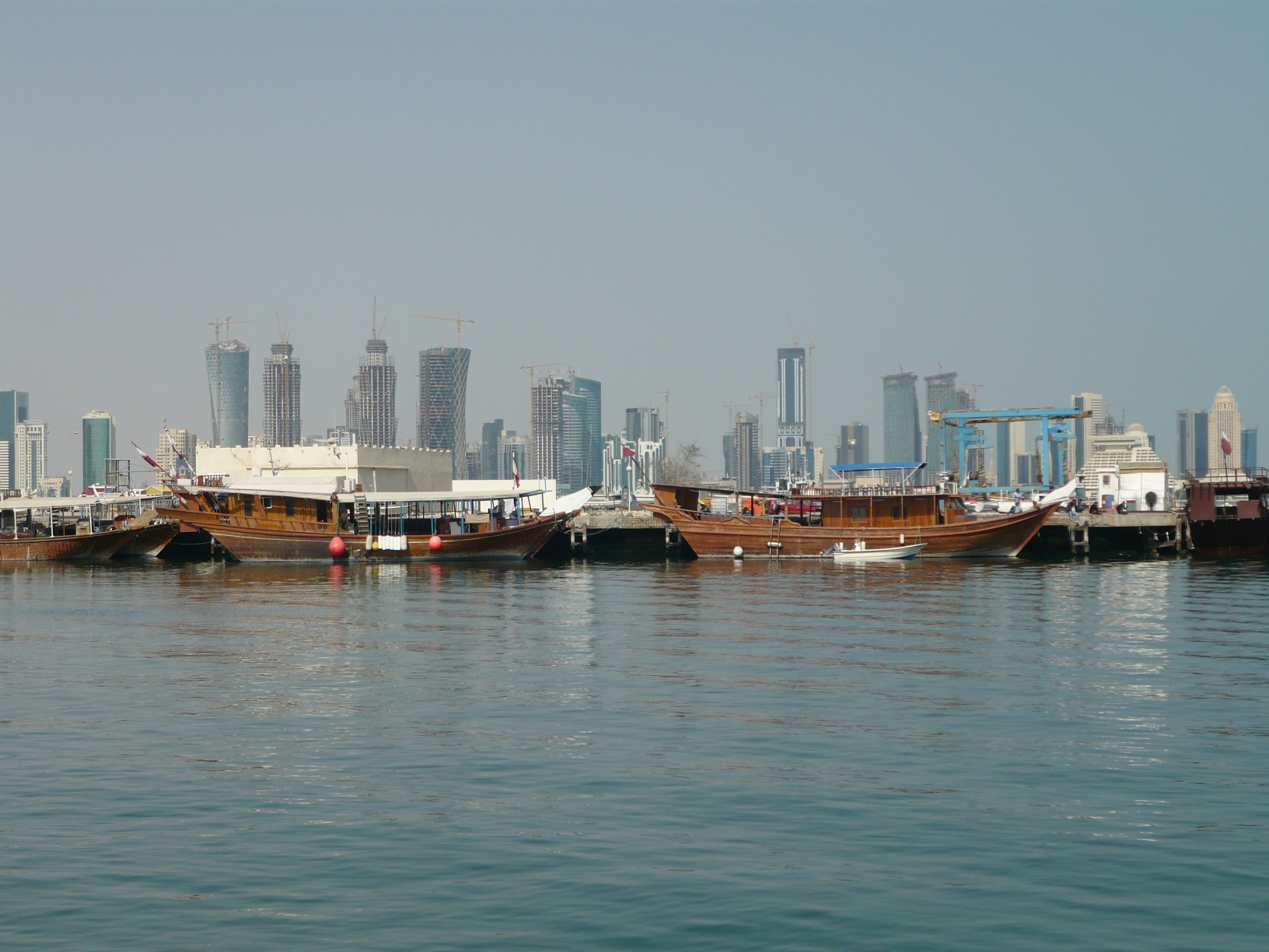 Noul centru al orașului Doha, Qatar